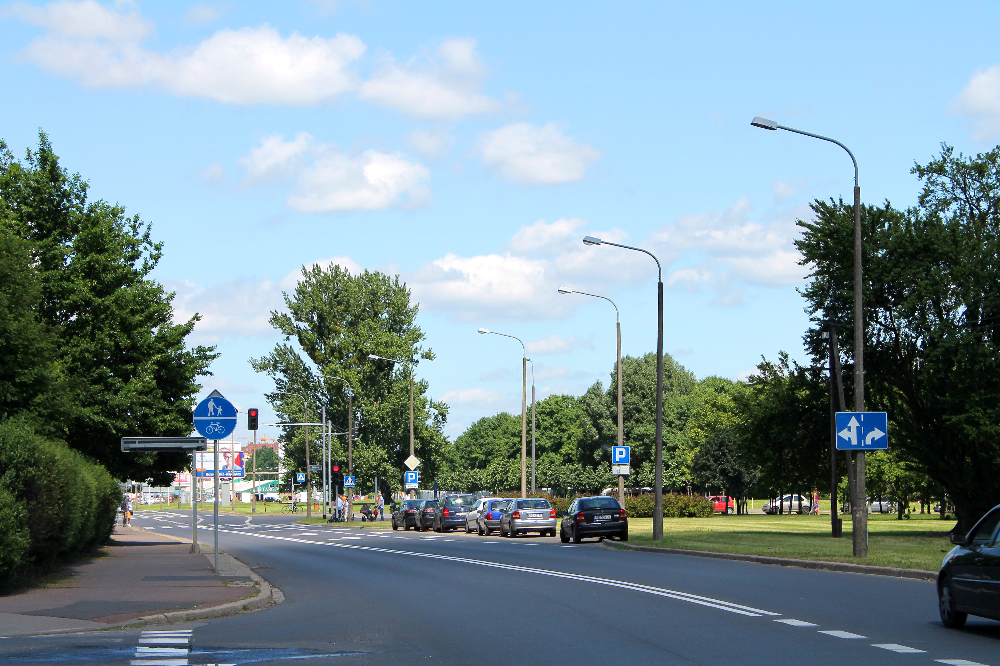 Ulica Dolna Wilda, po lewej skrzyżowanie z ul. Krzyżową, w głębi skrzyżowanie z ul. Żelazka